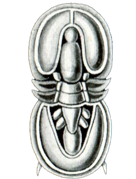 Agnostus pisiformis (Linné) = Agnostus pisiformis (Linnaeus, 1757), from above